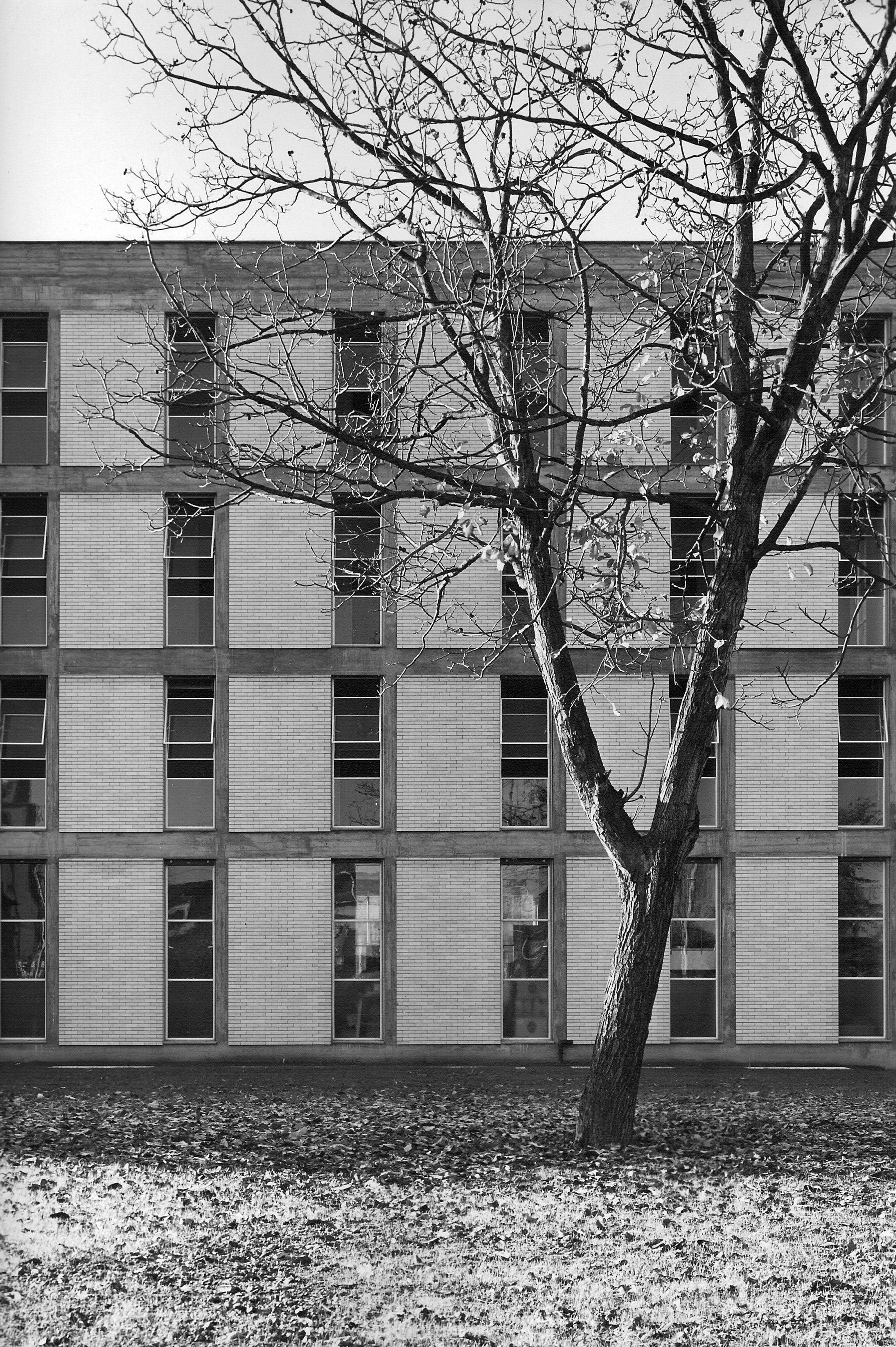 Lo schema dell’edificio è molto semplice. Due corpi di fabbrica paralleli a esposizione unica a sud sono destinati il primo alla vita interna del collegio, il secondo alle attività organizzative che hanno diretto contatto con l’esterno